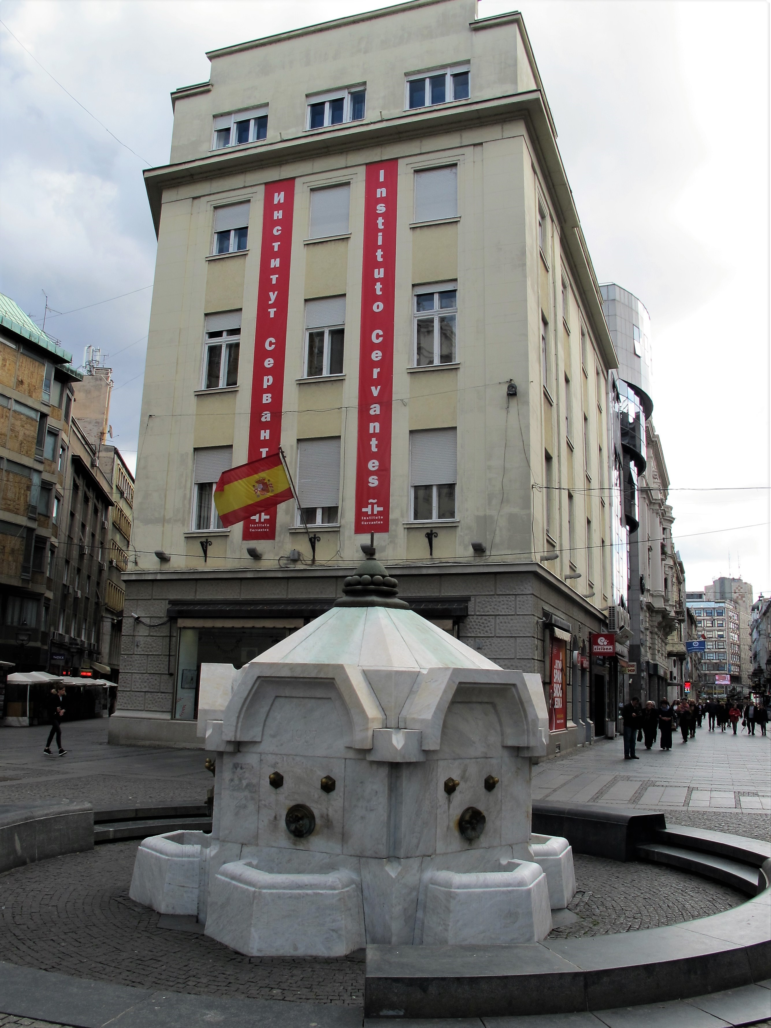 Plano general de la fachada del edificio del Instituto Cervantes de Belgrado